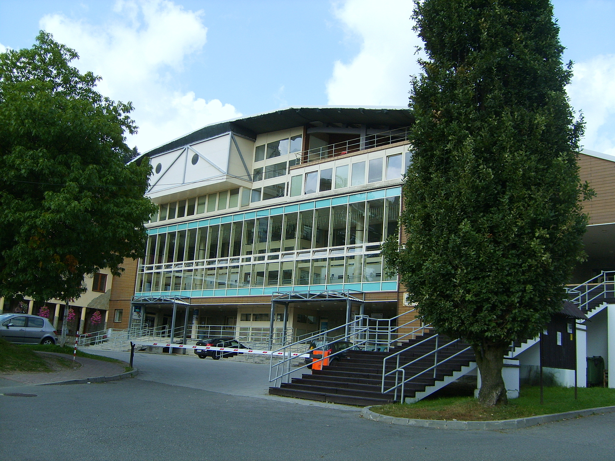 Hala widowiskowo-sportowa w Krynicy-Zdroju.